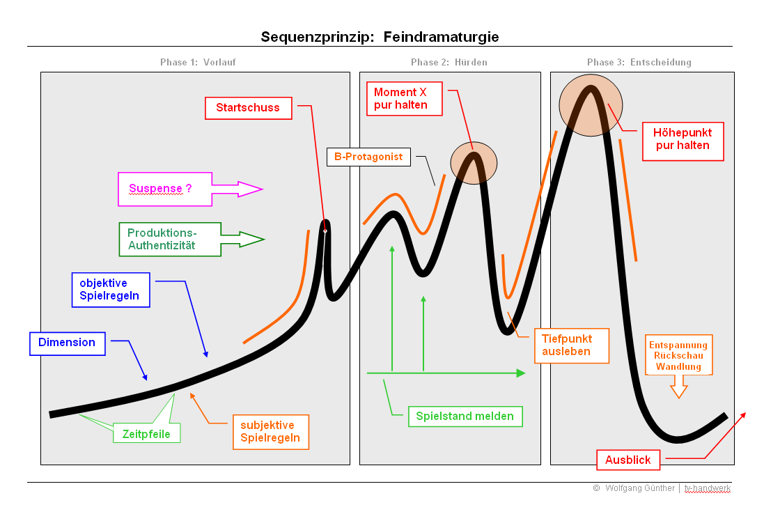 Sequenzprinzip